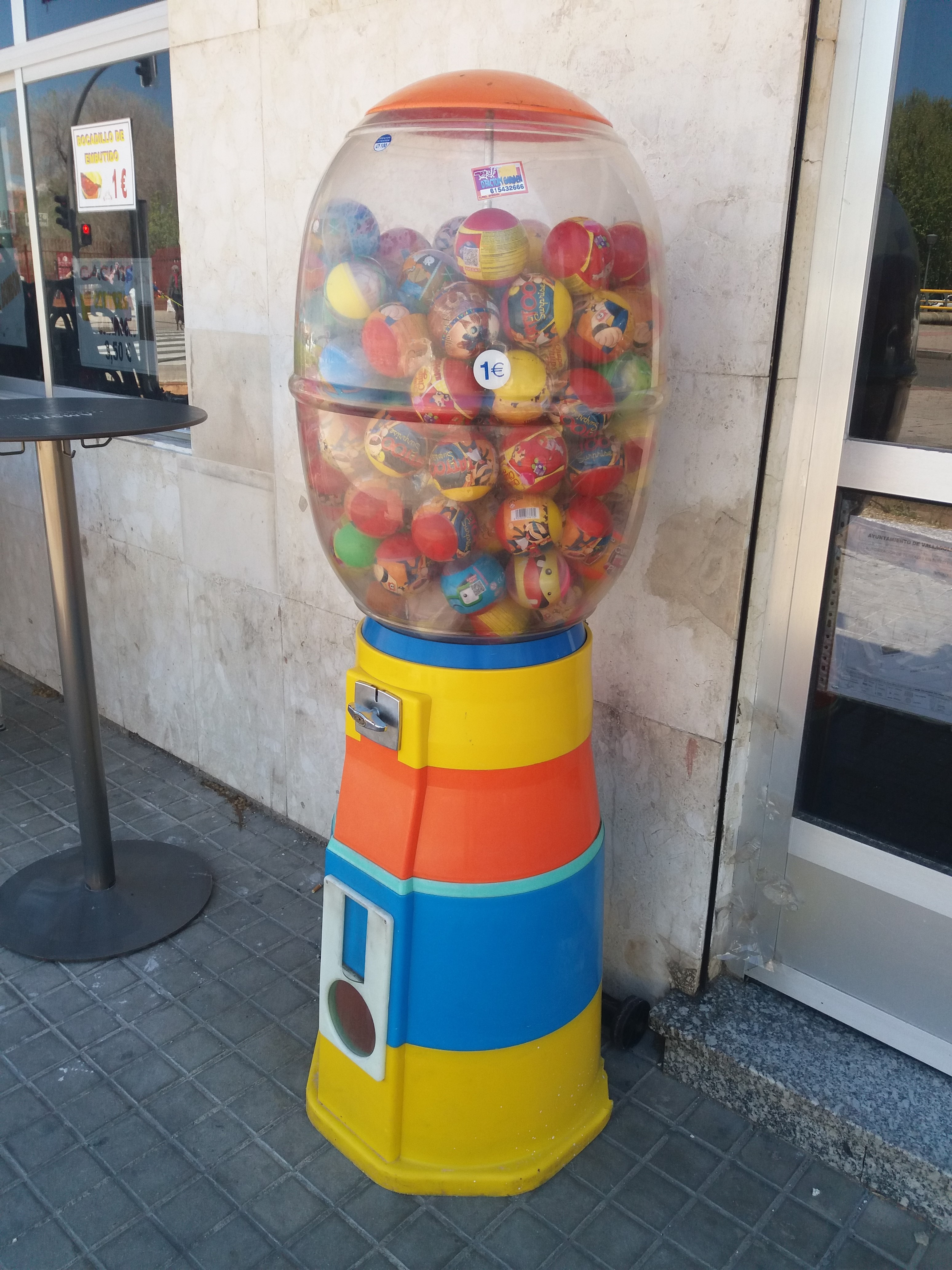 Máquina de gashapon en Valladolid (España)